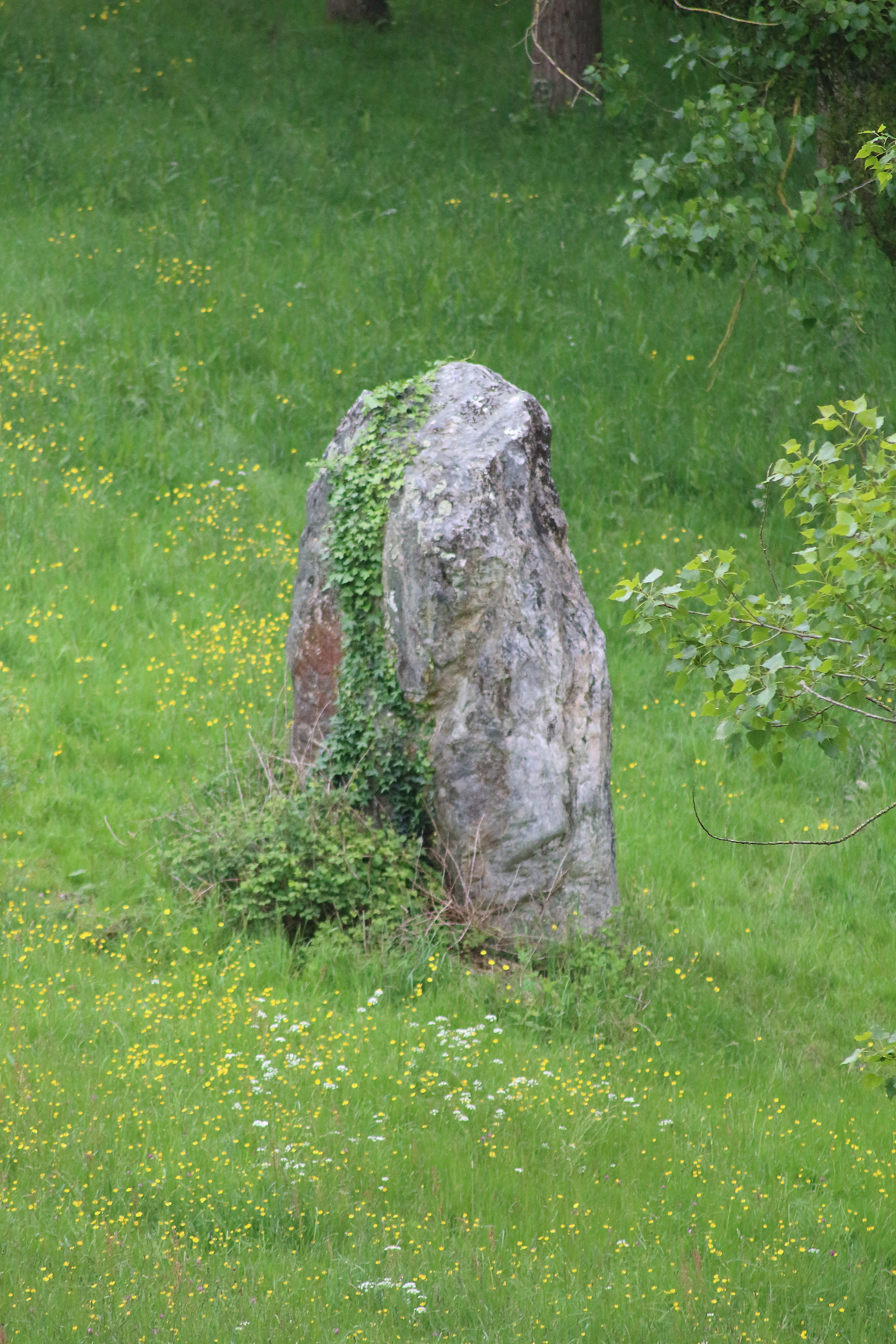 Menhir dit la Pierre de l'Horloge, commune de Saint-Saturin-du-Limet, Mayenne, Pays-de-la-Loire, France